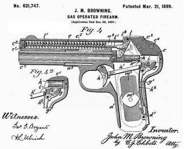 Ausschnitt aus der Patentzeichnung Browning US-Pat 621747, 1899